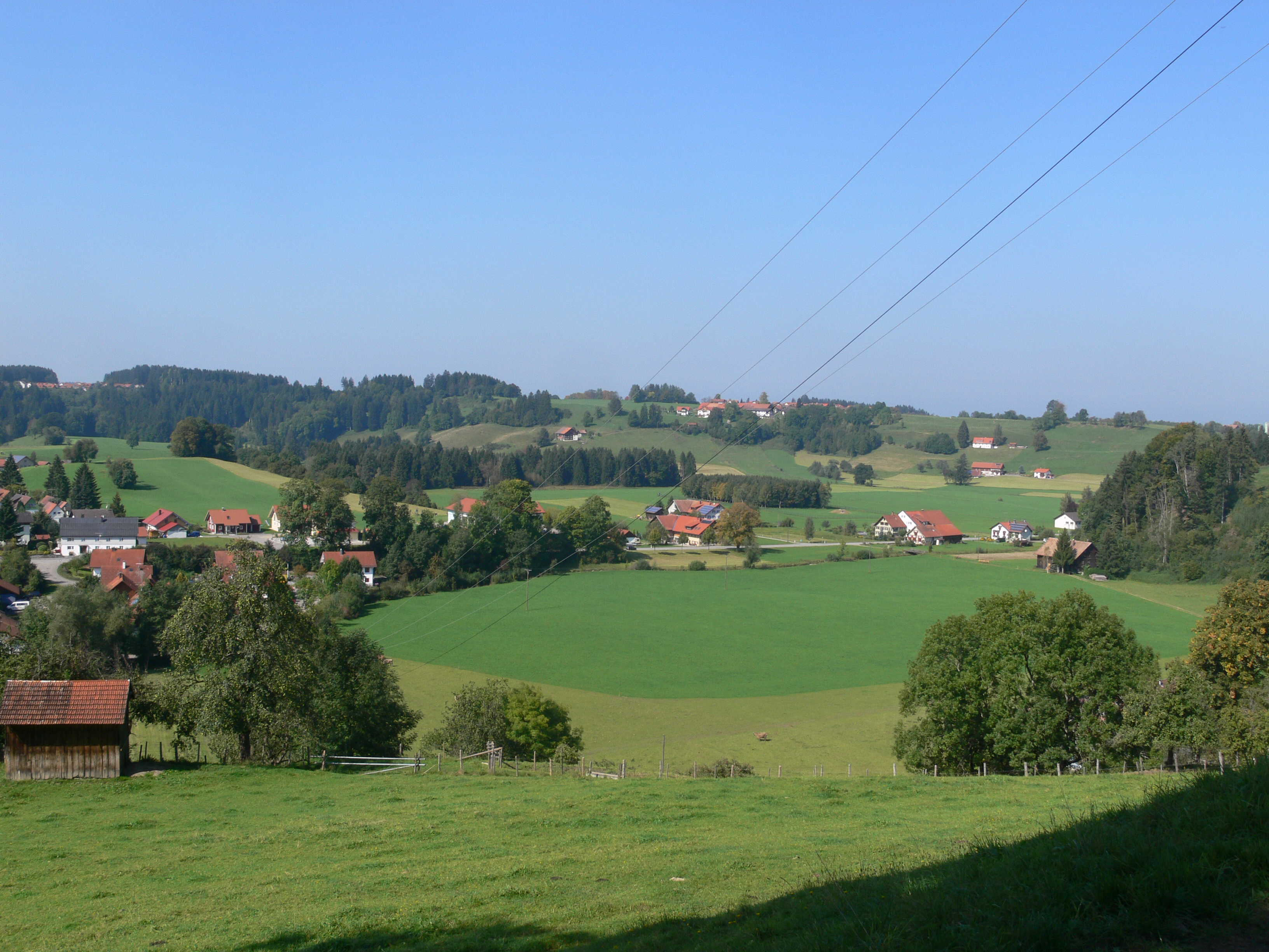 Allgäu-Landschaft bei Röthenbach im Allgäu, Landkreis Lindau, 2007